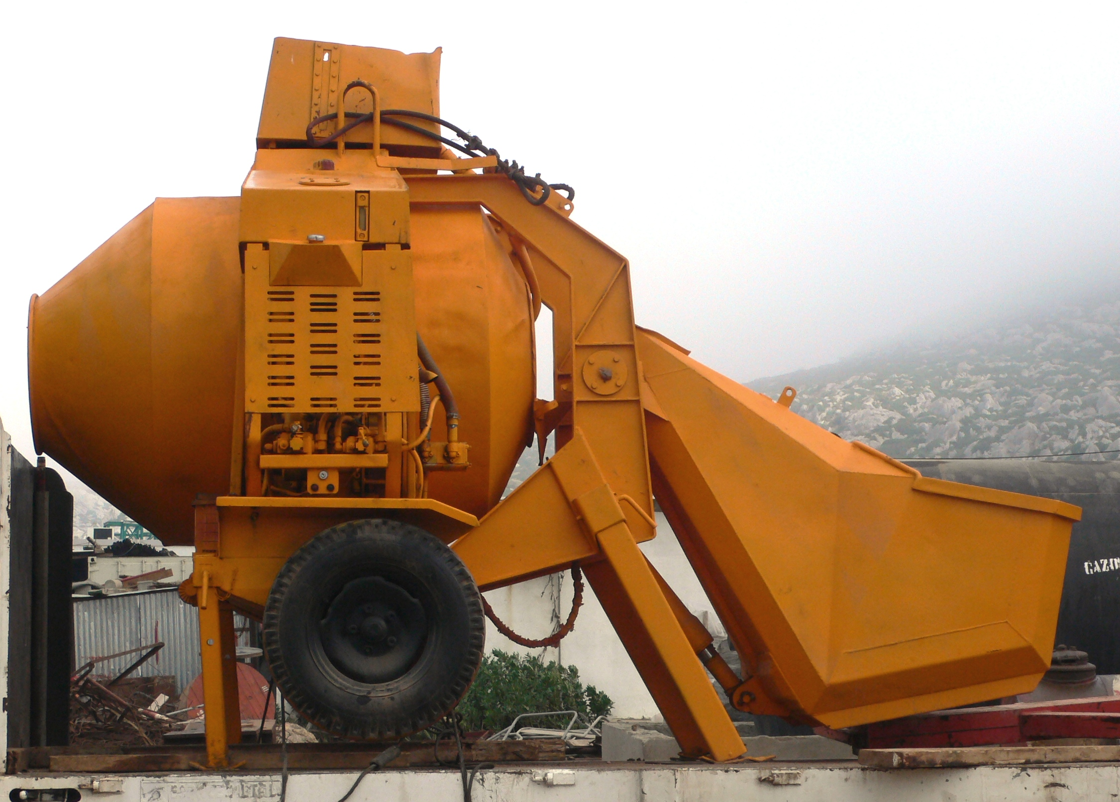 Bétonnière avec benne de chargement utilisée sur les chantiers de construction